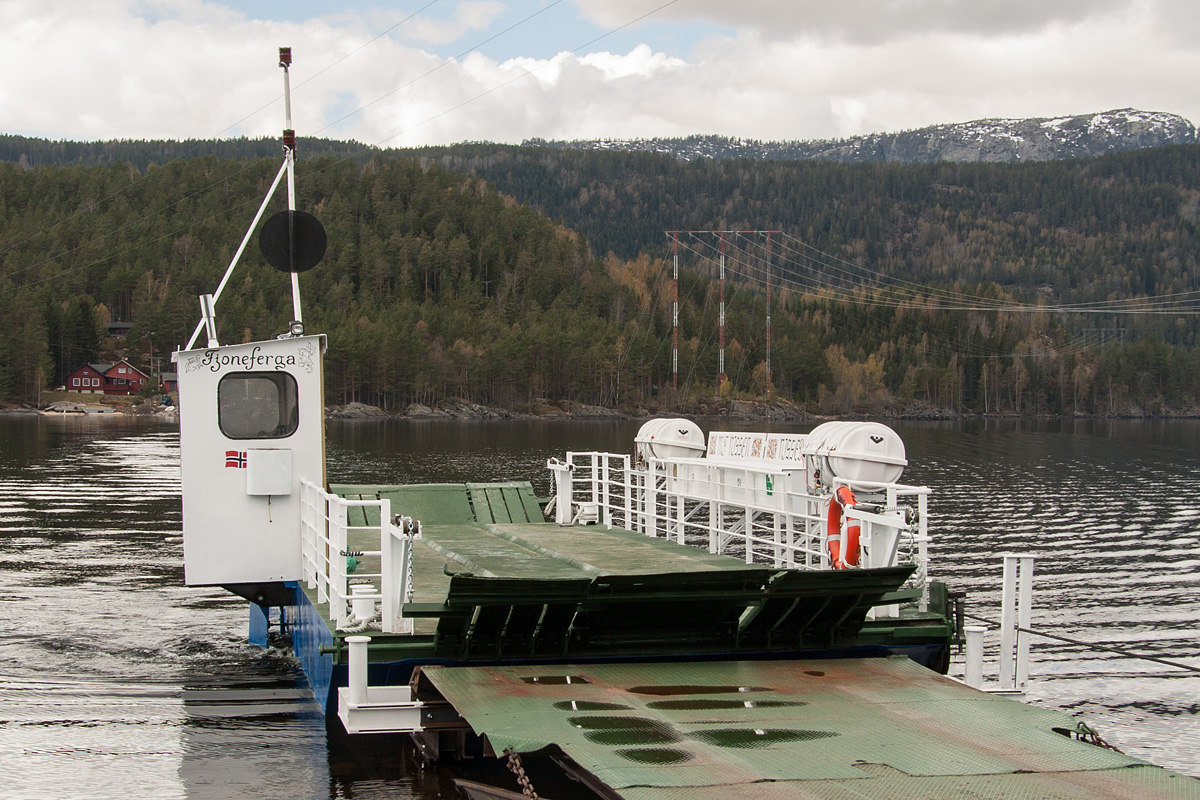 MF «Nissen» ankommer Sundsodden.